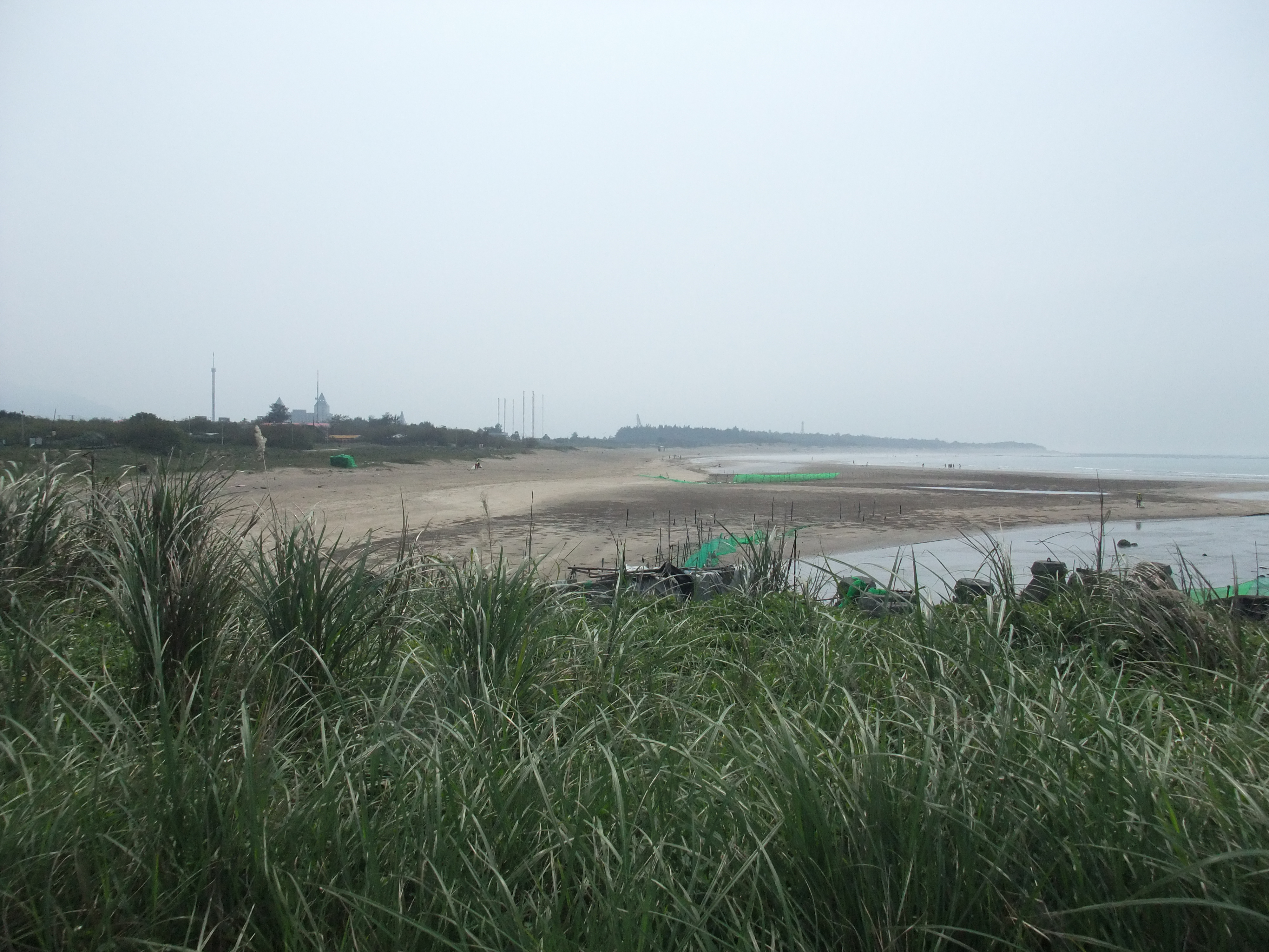 中文（台灣）: 沙崙海水浴場